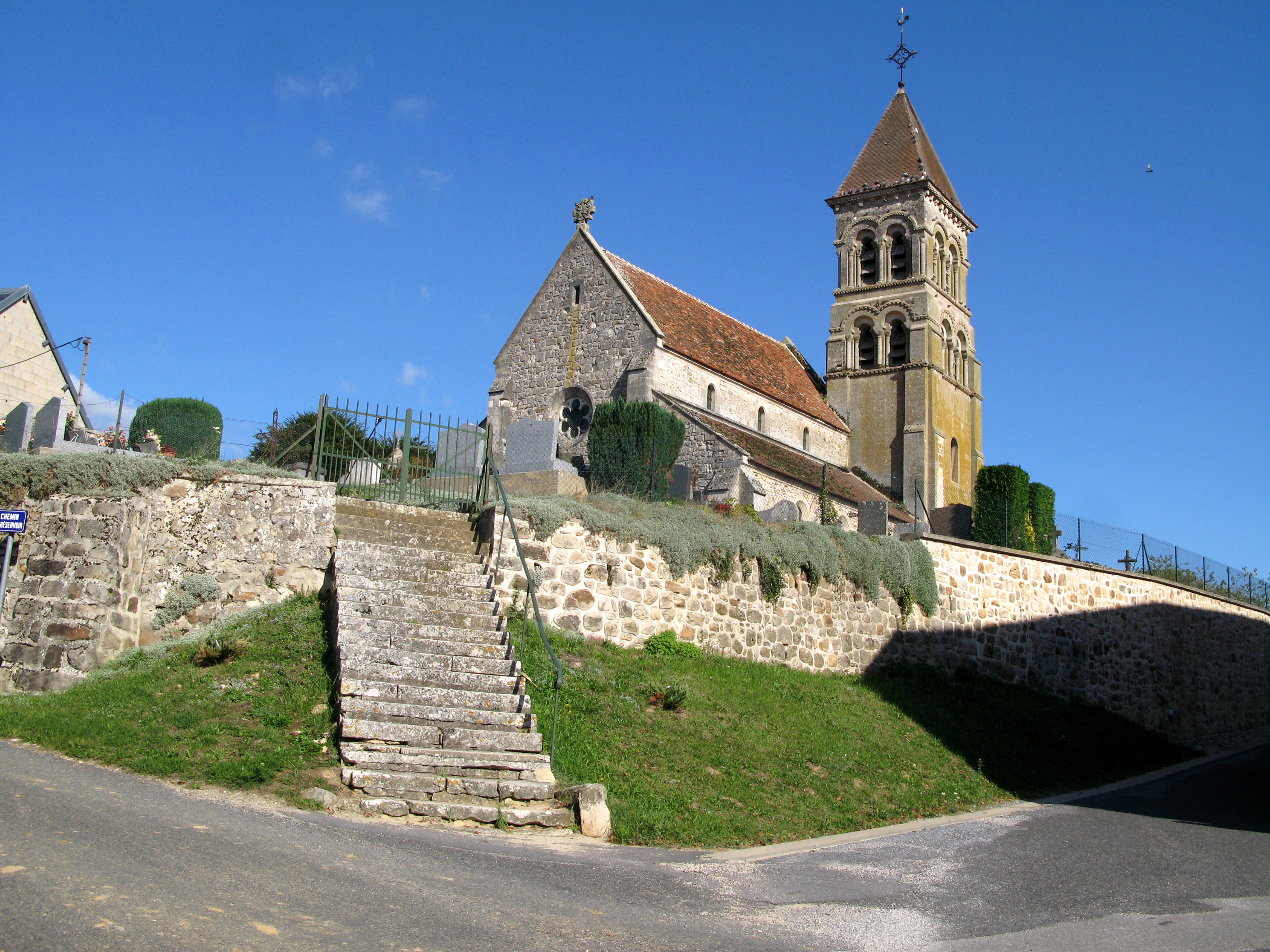 Oulchy-la-Ville (Aisne, France) - L'église Saint-Pierre. . . .